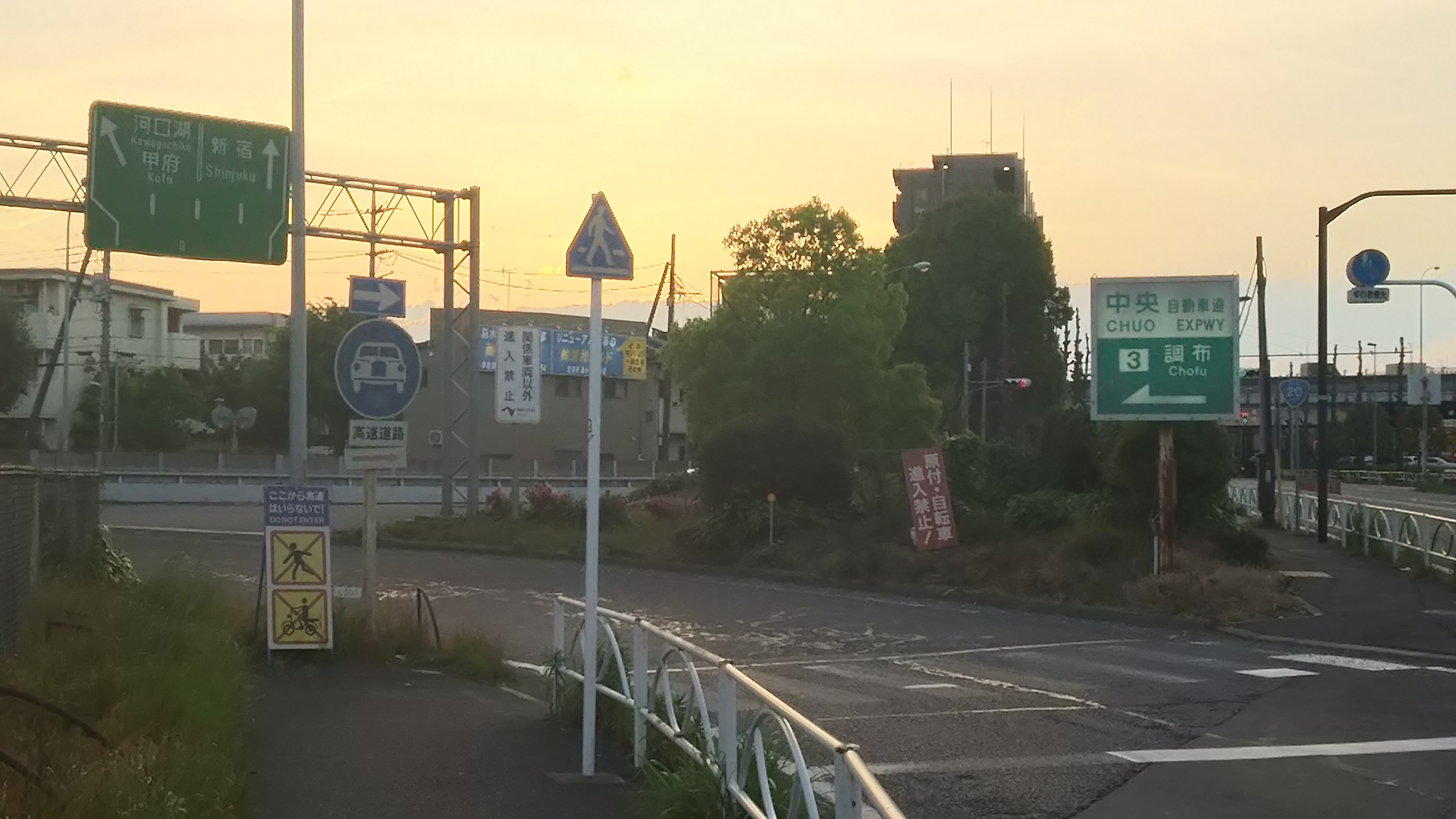 国道20号